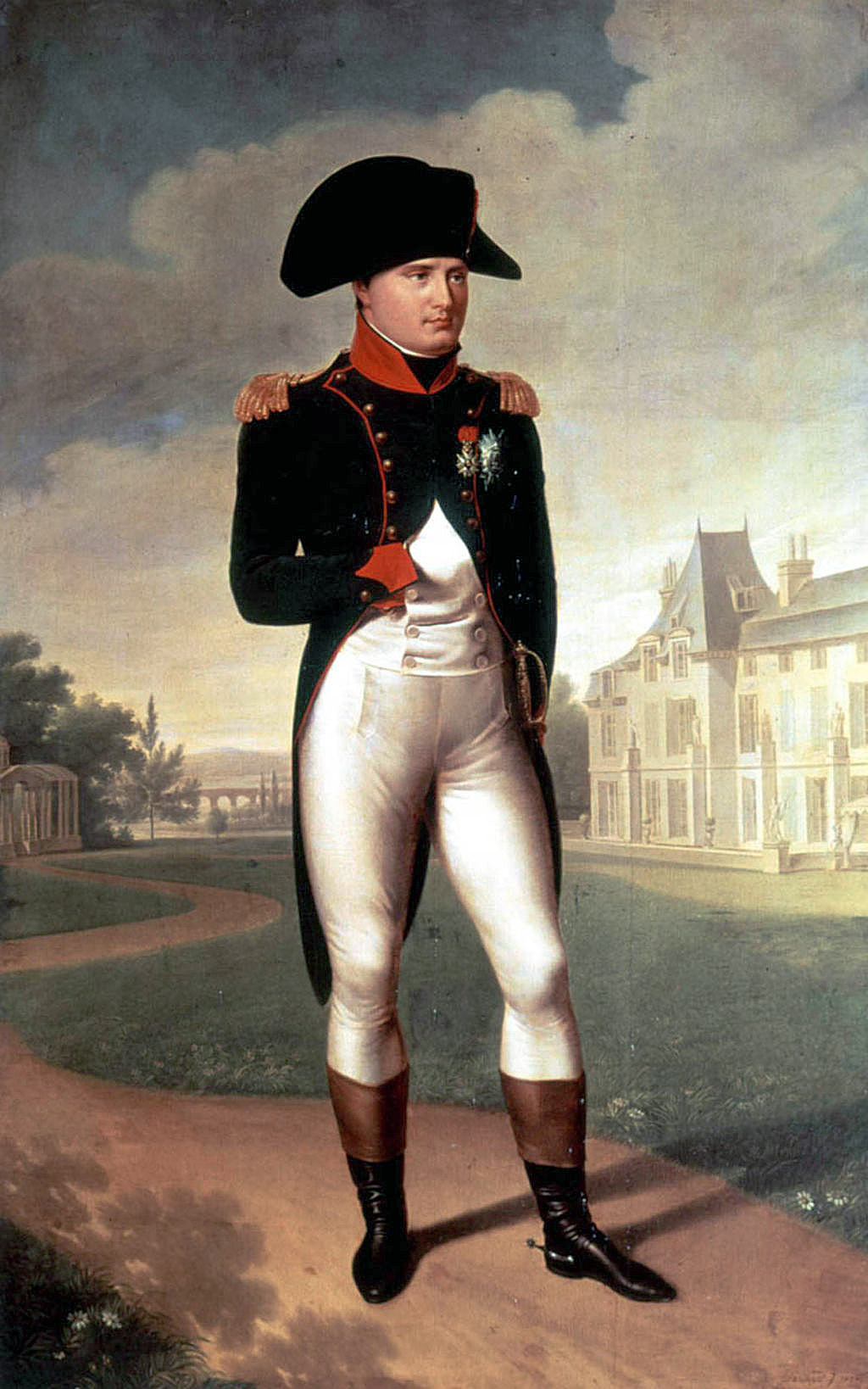 Napoléon Ier devant le château de Malmaison, anonyme 1804 Musée national du Château de Malmaison.